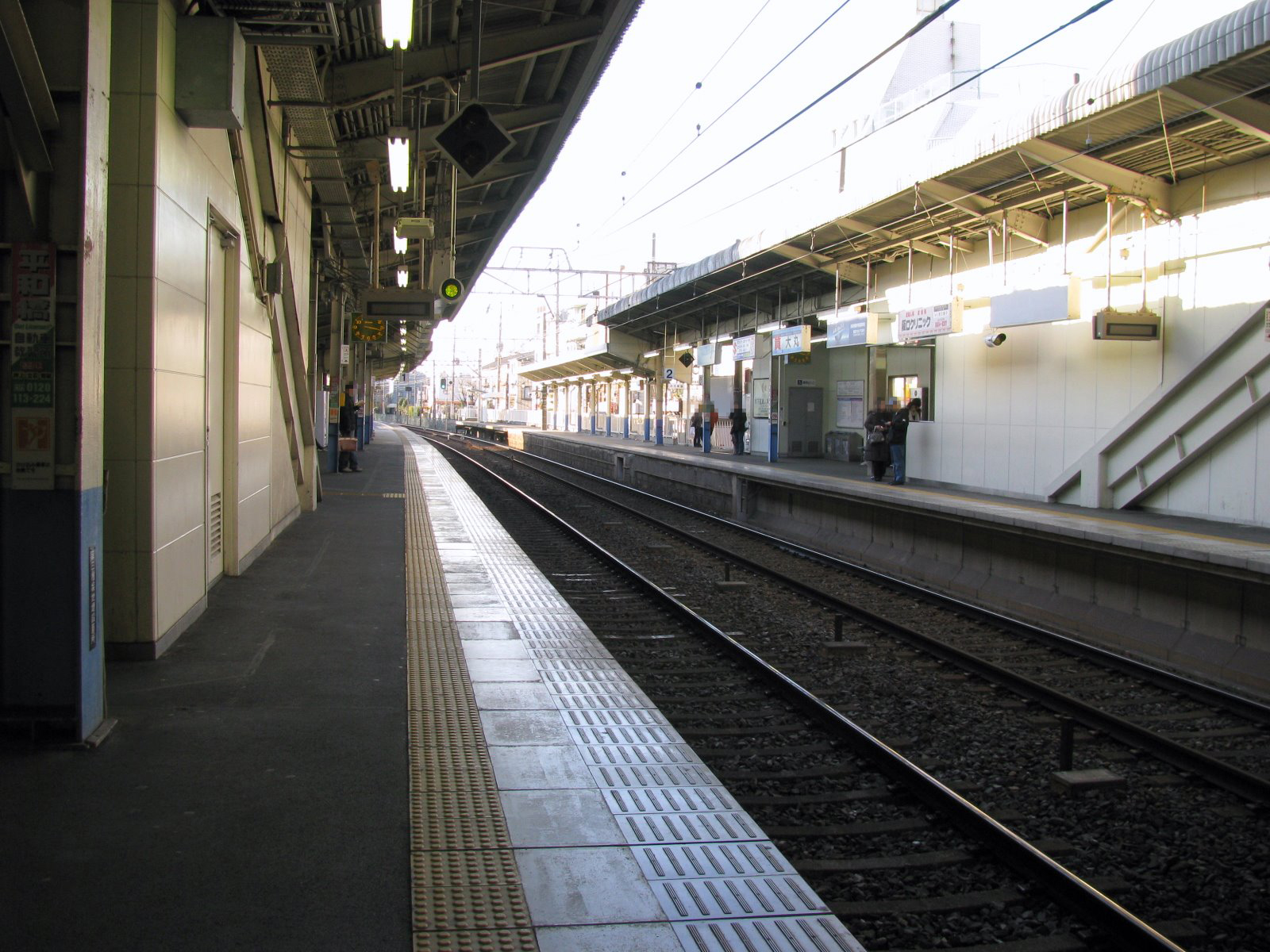 京成電鉄お花茶屋駅